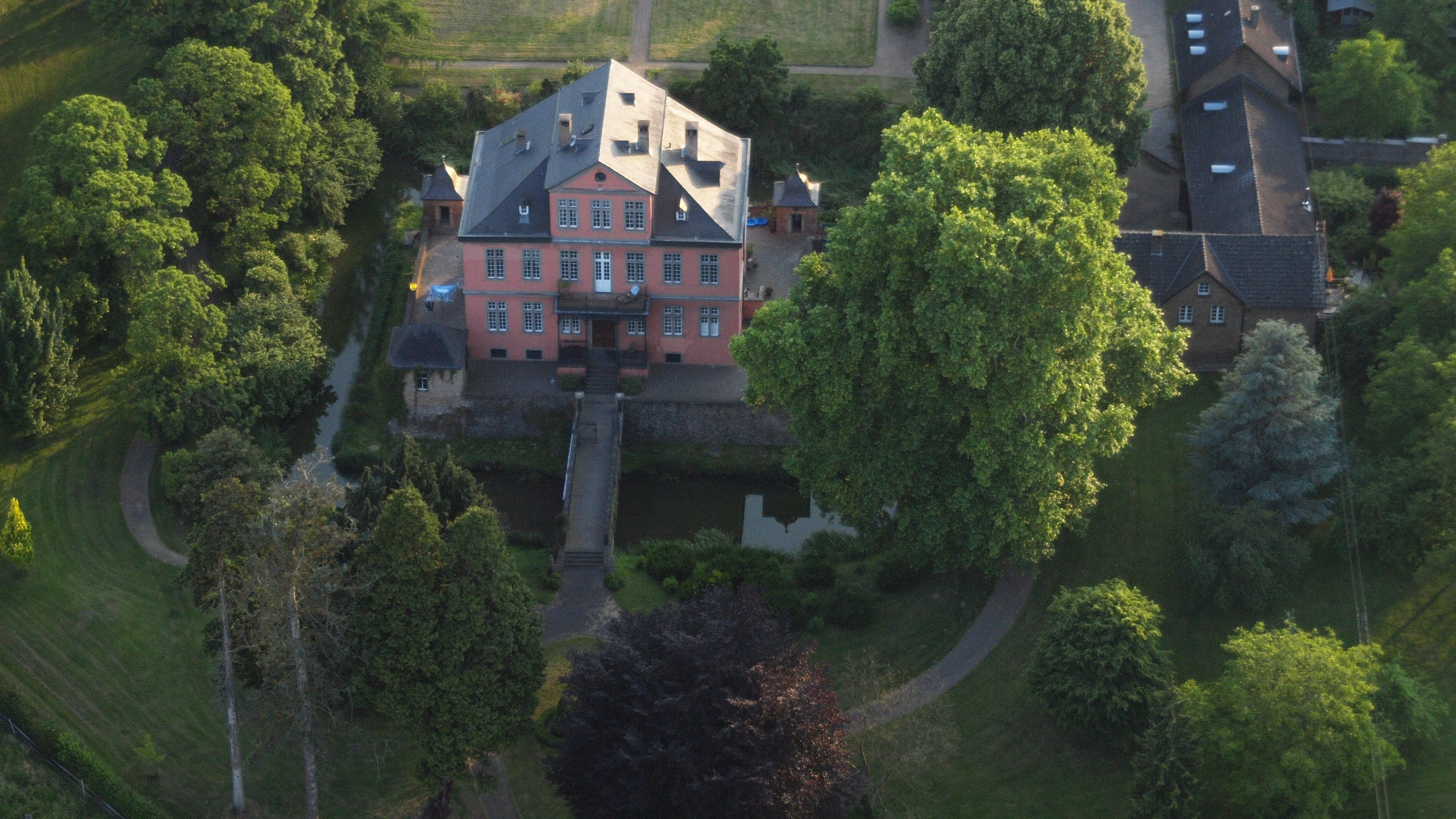 Kitzburg, Bornheim-Walberberg: Luftaufnahme